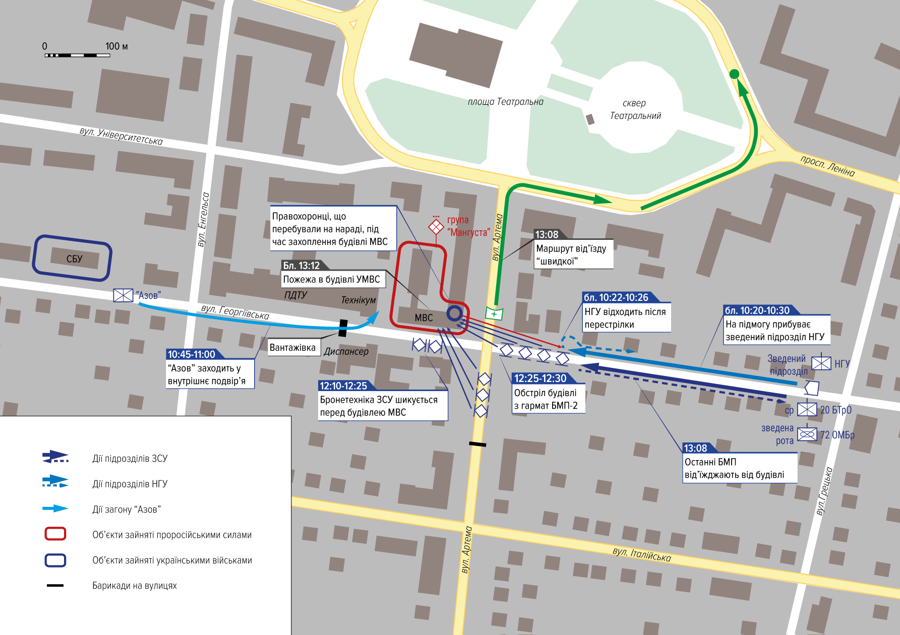 Бої в Маріуполі 09.05.2014. Українські війська намагаються звільнити захоплену будівлю